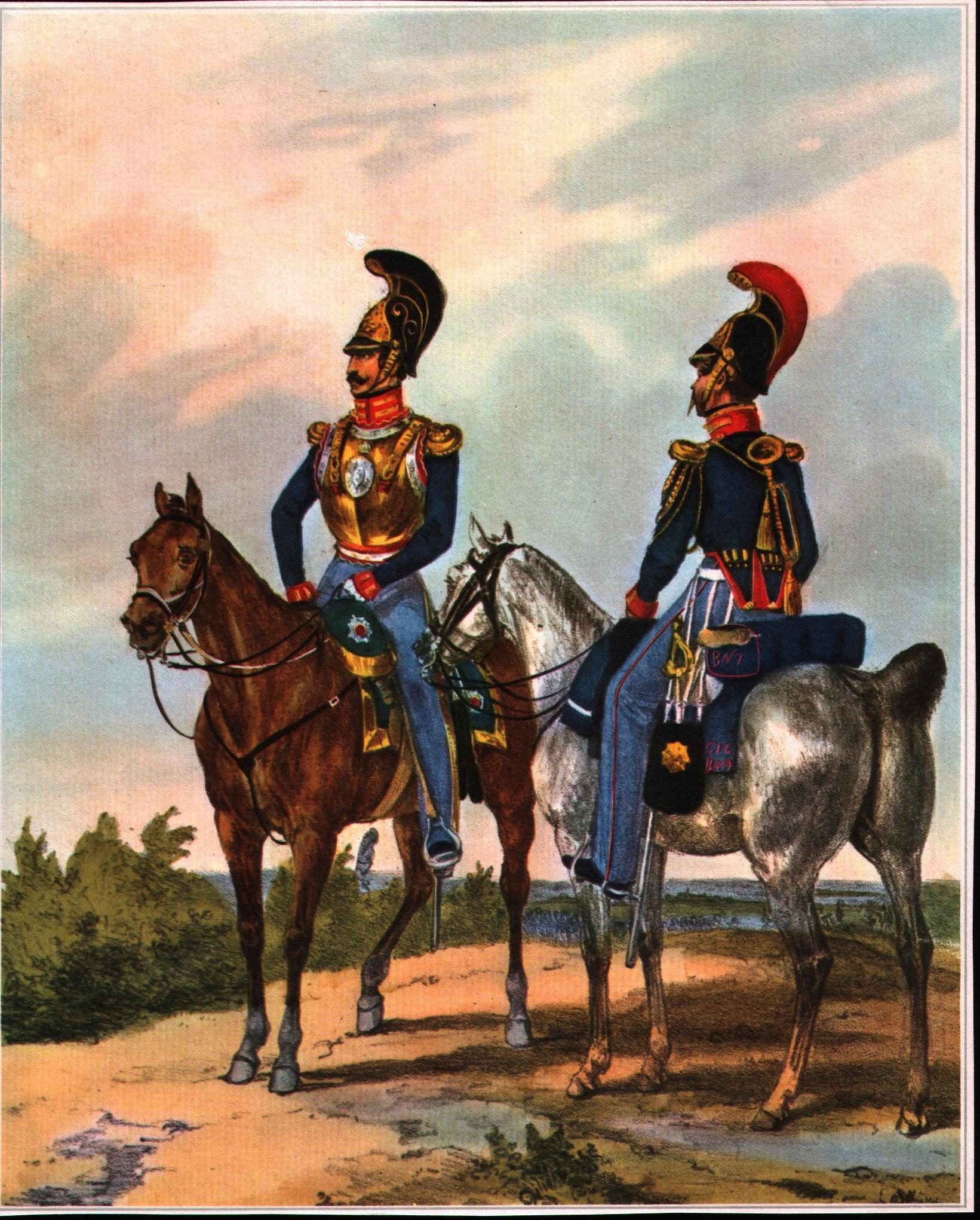 Garde du Corps des Königreichs Hannover Mitte des 19. Jahrhunderts